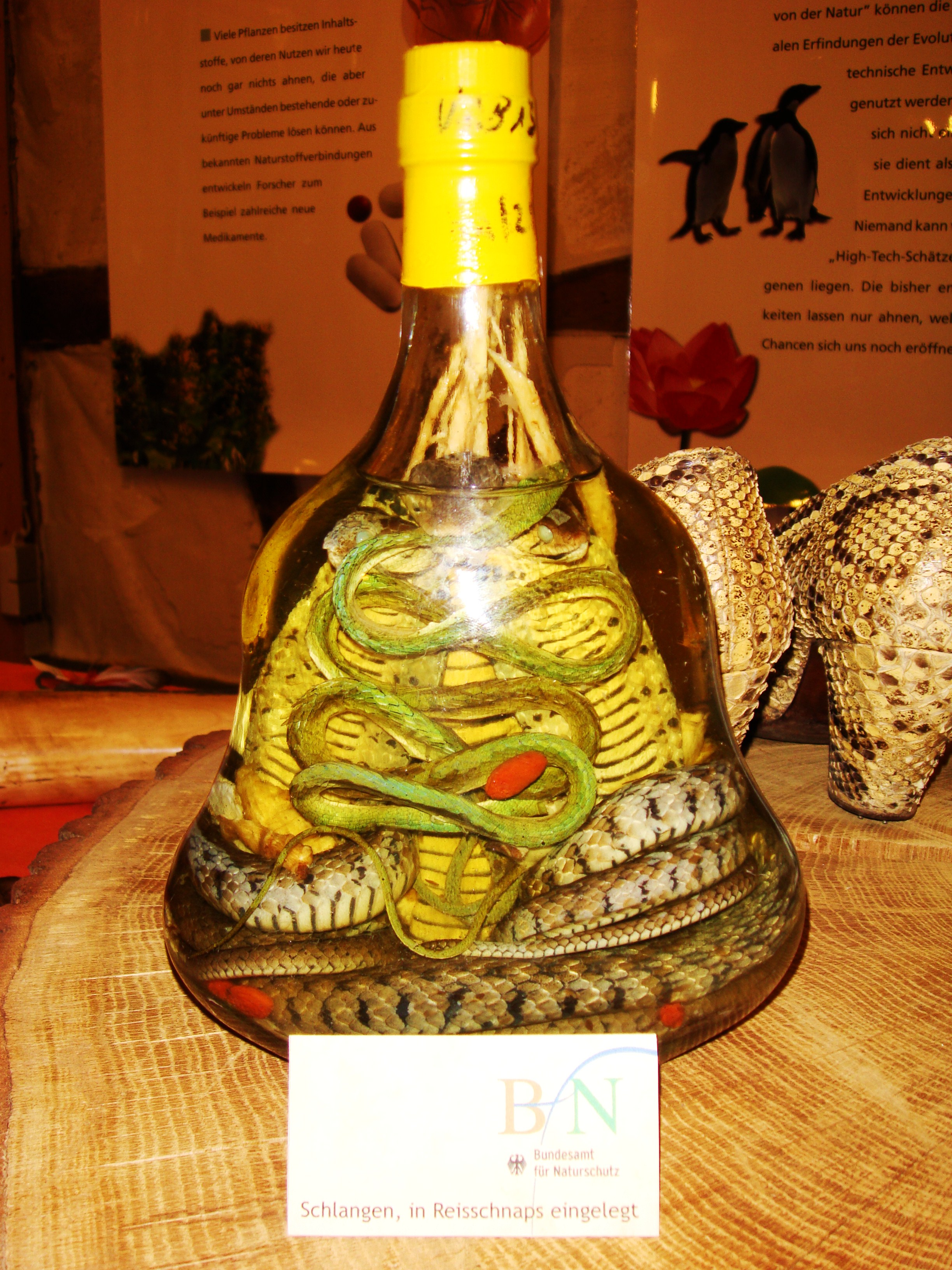 Vom Zoll beschlagnahmte Reisschnapsflasche mit Schlangeninhalt